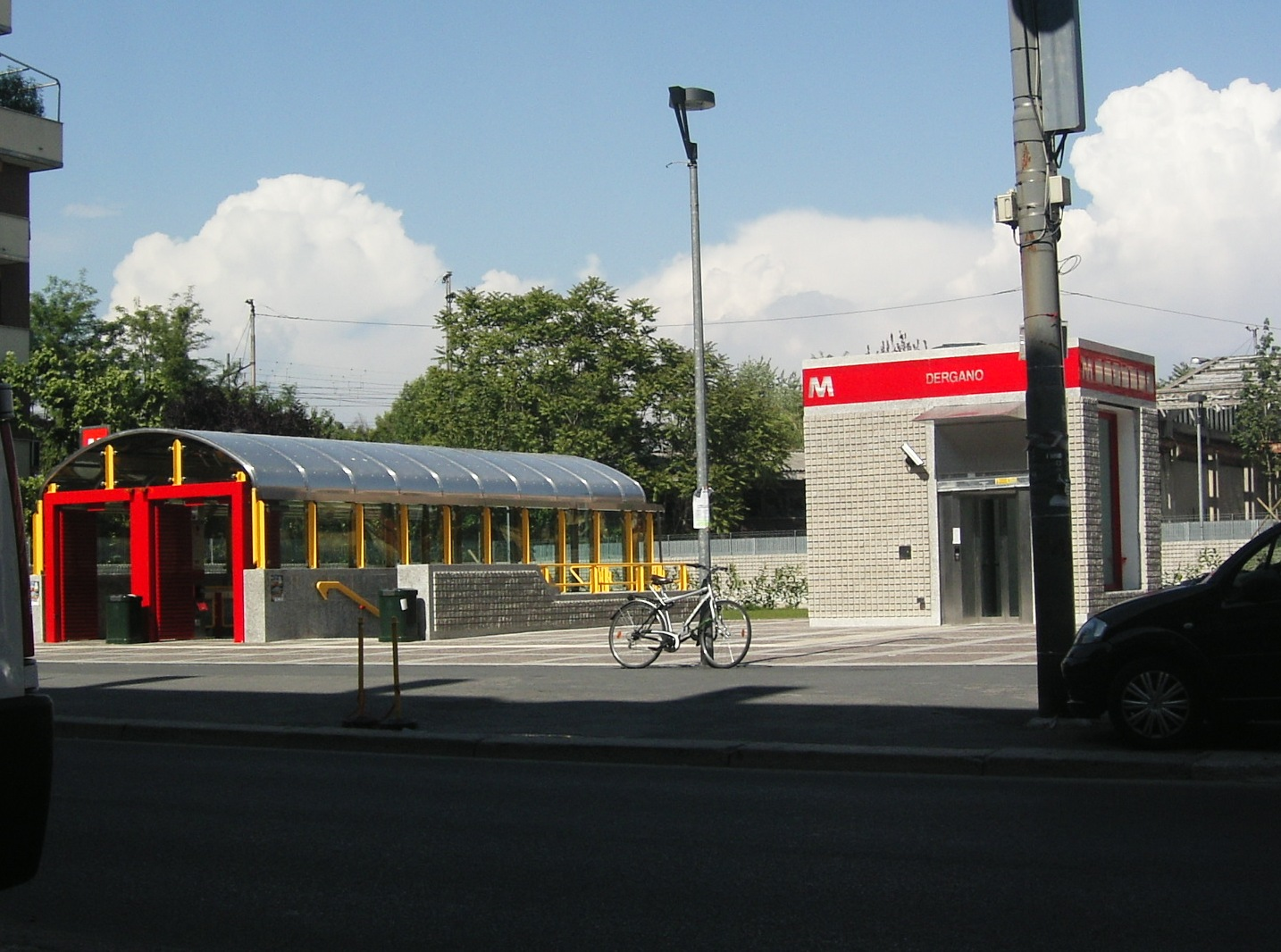 Esterno della stazione di Dergano della metropolitana di Milano.